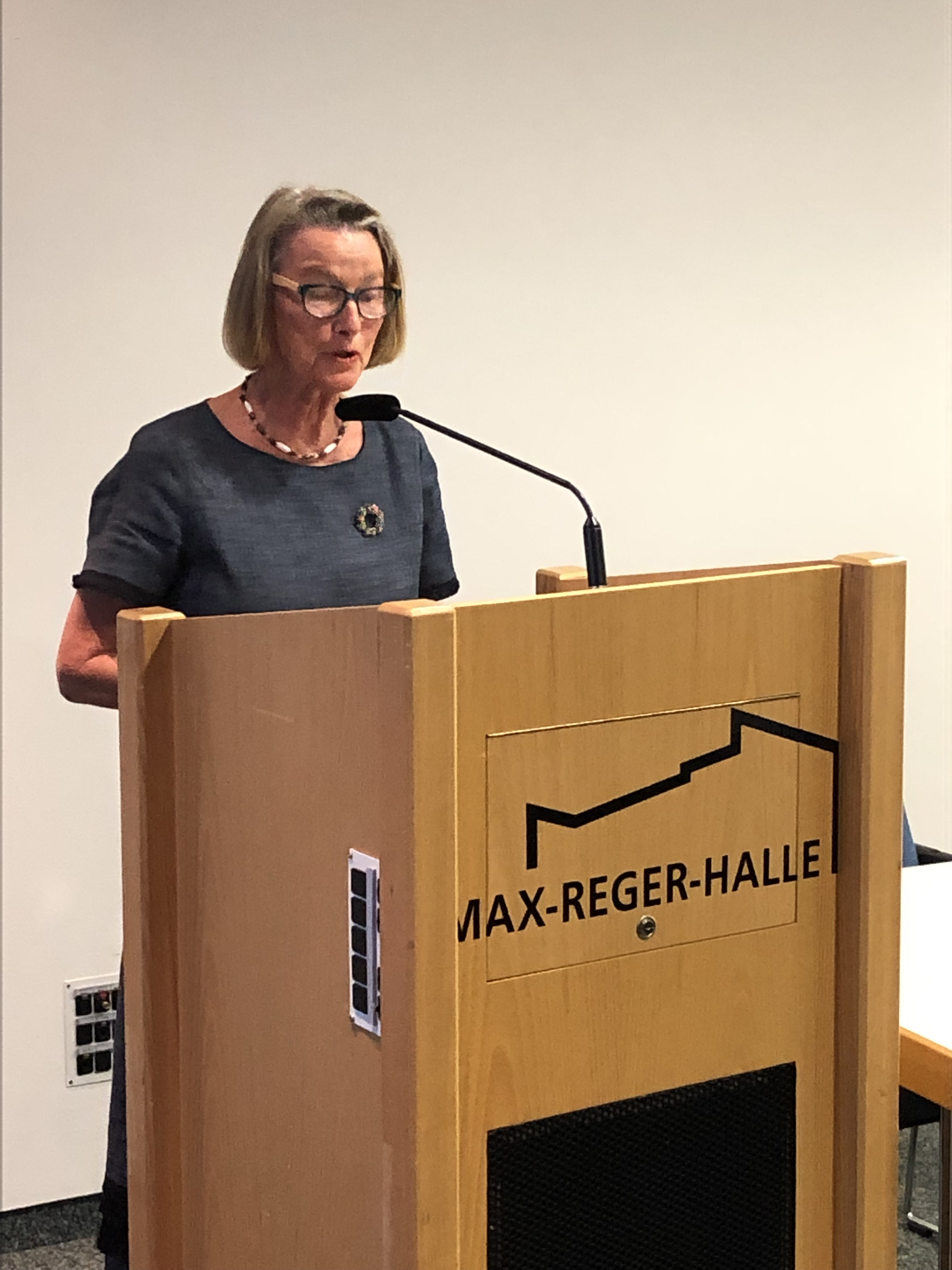 Prof. Dr. Susanne Popp, die einstige Chefin des Max-Reger-Instituts Karlsruhe